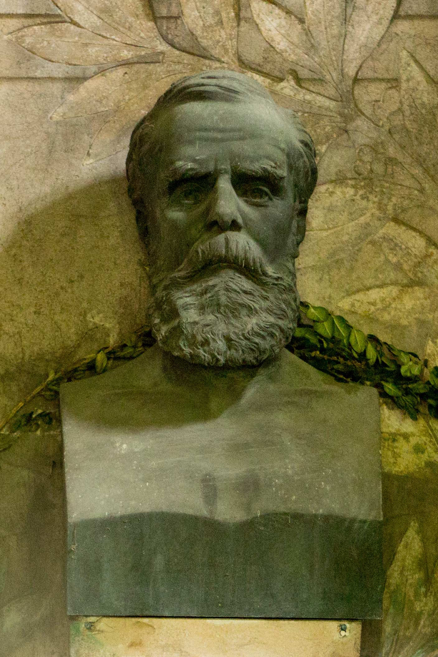 Sépulture d'Émile Raspail (1831-1887), industriel et homme politique, fils de François-Vincent Raspail, chimiste biologiste et homme politique français. « Monument de caractère étrusque. Il est composé d'un soubassement en granit de Vire, de forme rectangulaire, couronné d'un attique orné de pilastres. Une corniche avec frise comprenant des motifs sculptés se rattachant à la flore médicinale contourne le monument. Un sarcophage avec couronne pose sur le soubassement. La porte du caveau est en bronze ; elle a été exécutée par E. Legrain sur les dessins d'Ulysse Gravigny, architecte de ce monument, qui a été érigé en 1894. À l'intérieur du monument est placé le buste en bronze (H. 0m 60) de Raspail. Ce buste, exécuté en 1894, est l'œuvre de E. Damé. » (Jouin, 1897)